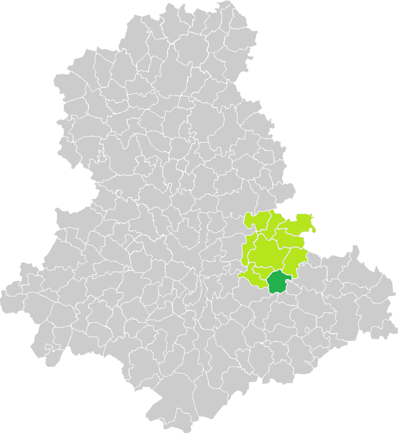 Carte de situation de la commune de Saint-Denis-des-Murs (en vert foncé) dans le votre Canton (en vert clair) sur une carte des communes de la Haute-Vienne